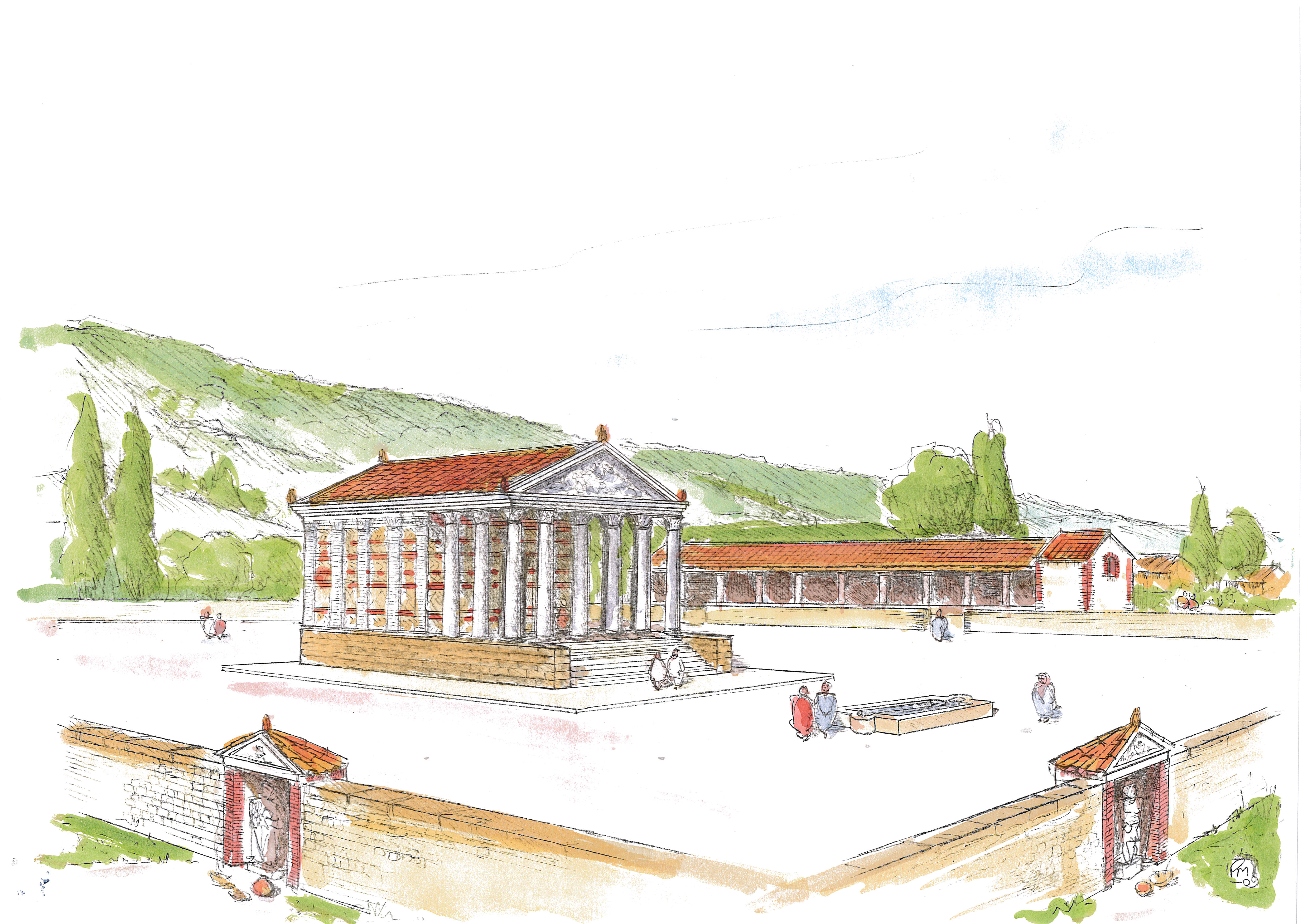 Proposition de restitution du grand temple de Cherré. Dessin original de Pascal Mariette.